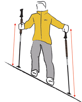 Using Trekking Poles